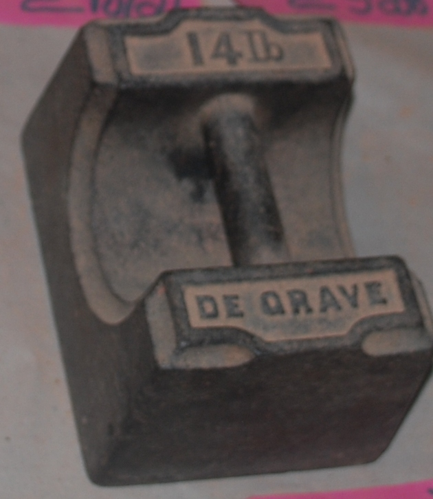 പൗണ്ട്,ഒരു പഴയ കാല അളവു തൂക്കം